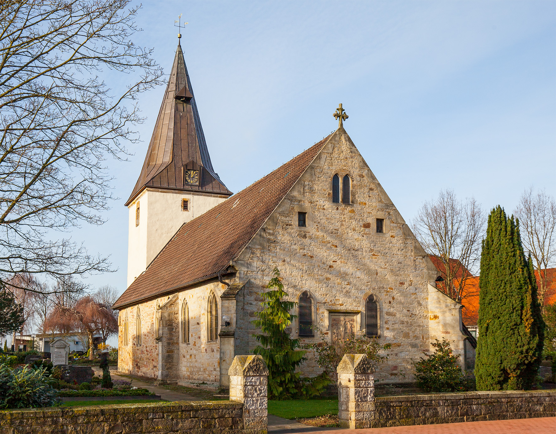 St. Nikolai Kirche in Wiedensahl, Schaumburger Land, Niedersachsen.